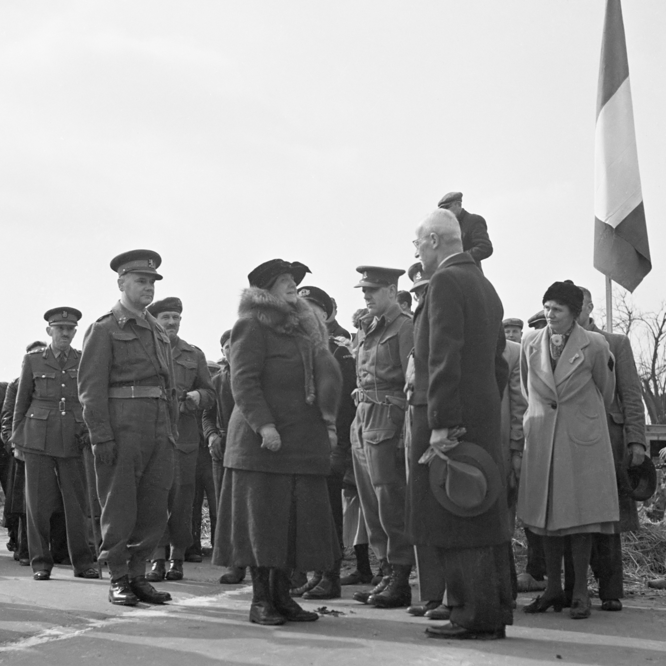 De gehele tocht van H.M. de Koningin door Zeeland, Brabant en Limburg: Koningin Wilhelmina passeert de meelstreep in Eede (Zeeuws-Vlaanderen) 13 maart 1945